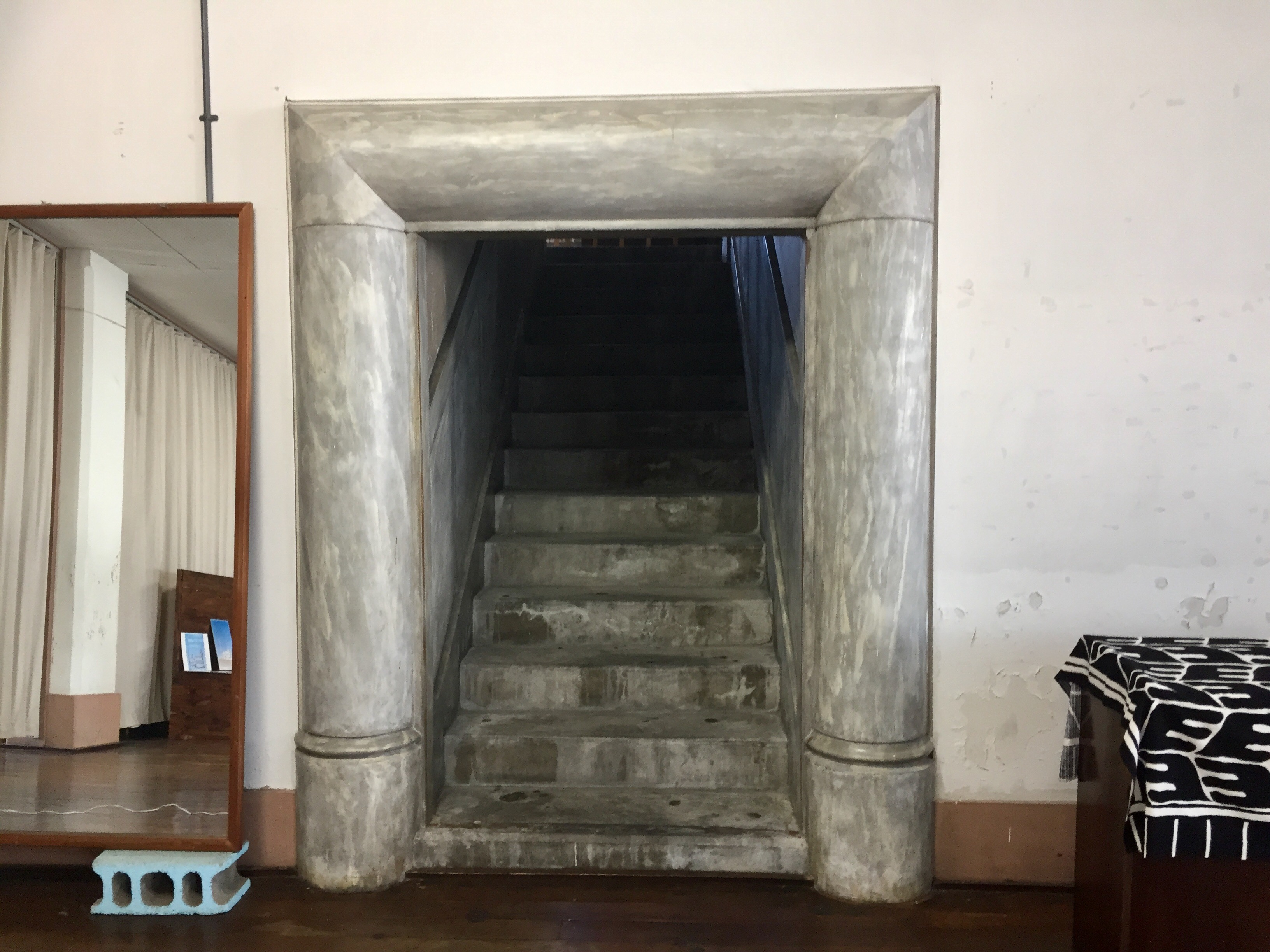 今治ラジウム温泉の2階ホールから3階ホテルに向かう階段入り口。階段途中の踊り場には戦時中、郷土防衛隊本部が置かれていた頃の無線機類が残っている。モルタル壁面を大理石様に仕上げるマーブル技法が見られる。 ※見学会で許可を得て撮影